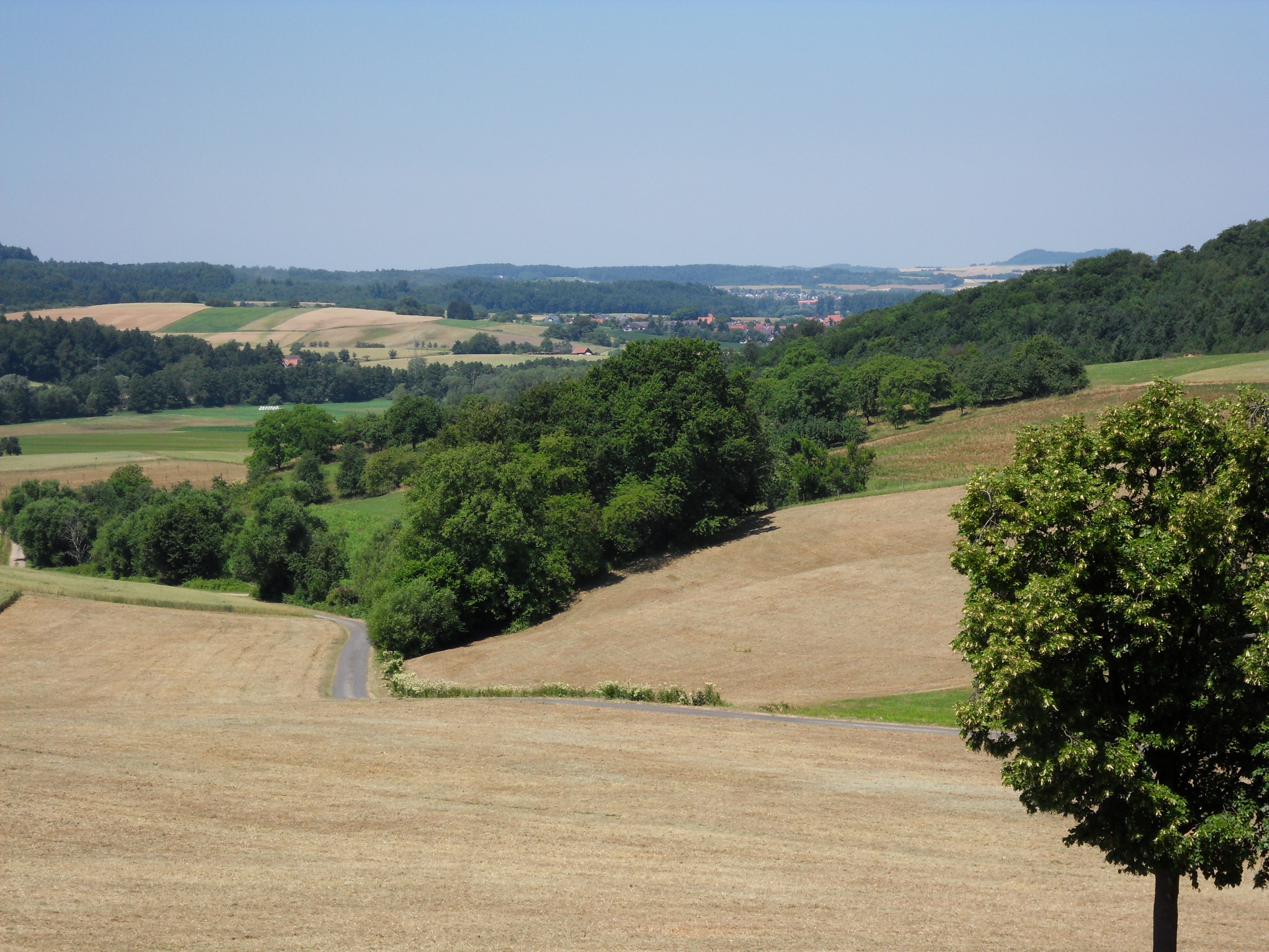 Blick über das untere Tal des Kilsbachs zur Gersprenzaue nach Nordwesten; in der Bildmitte hinten liegen Wersau und Groß-Bieberau